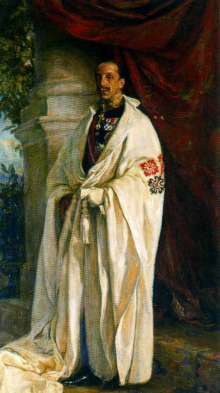 Retrato del rey Alfonso XIII de España (1886-1937) con el hábito de Gran Maestre de las Órdenes militares españolas.